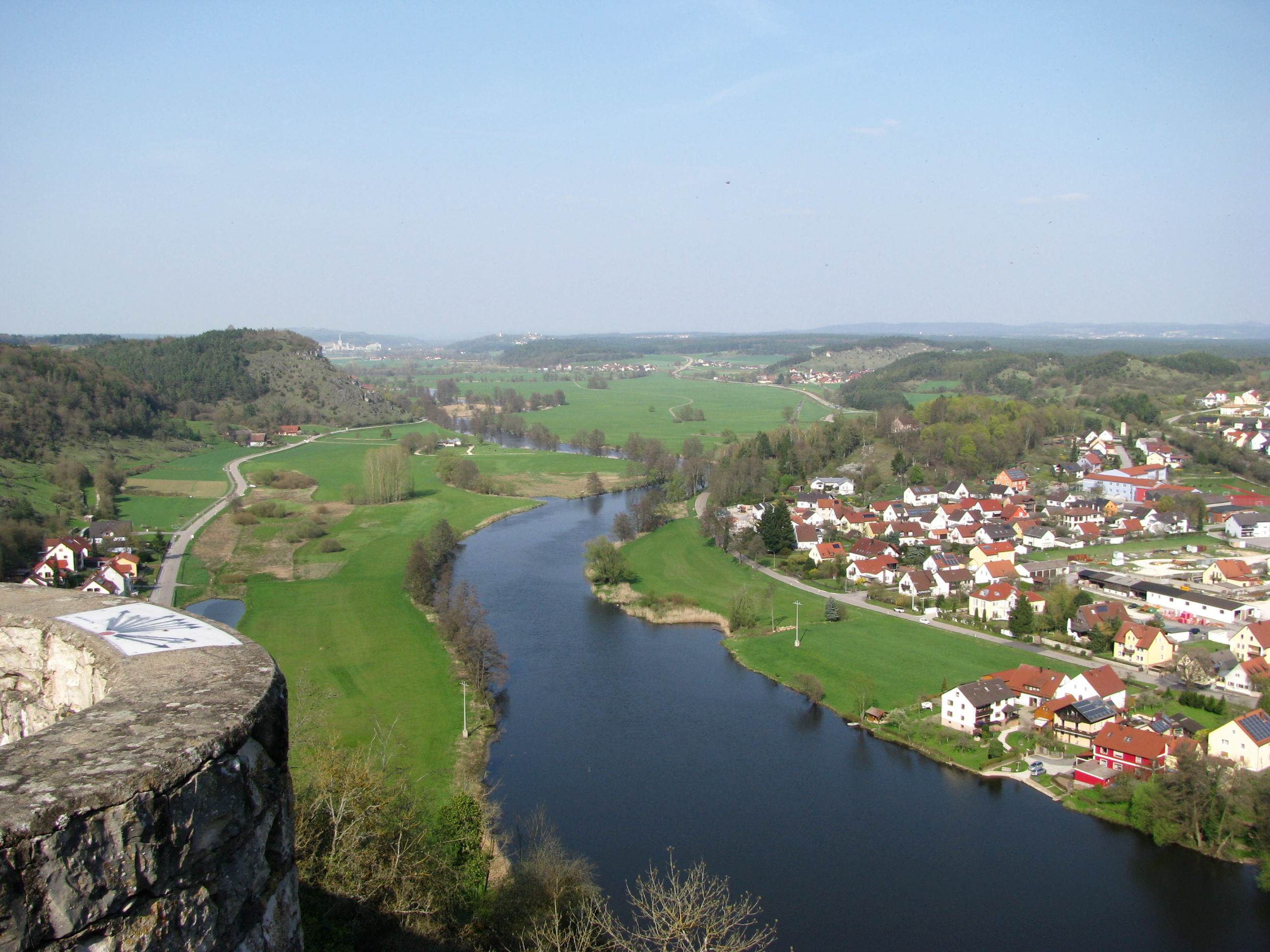 Burgruine Kallmünz; Blick auf die Naab und Kallmünz